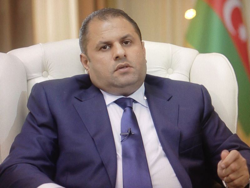 Tofiq Heydərov